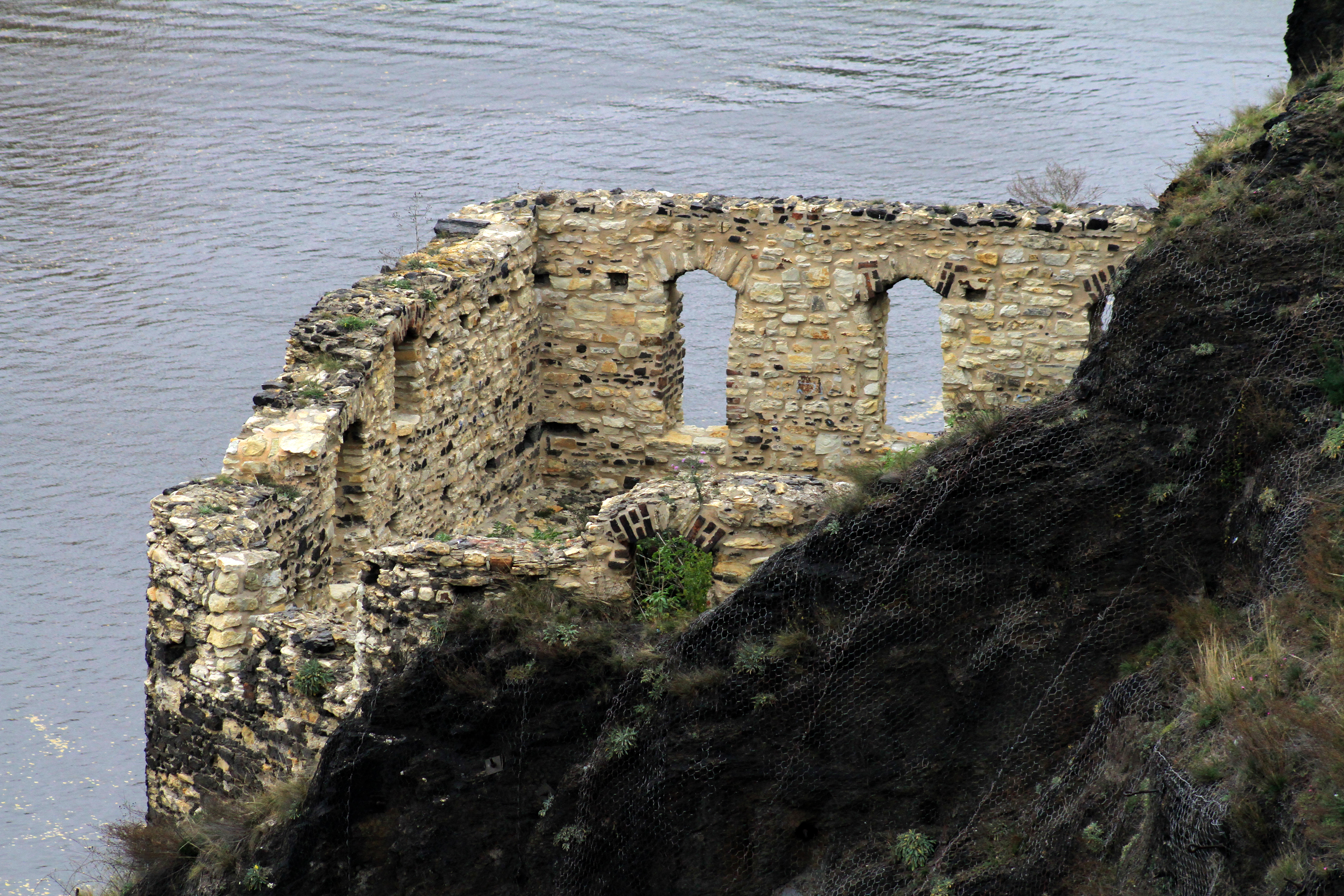 Pevnost Vyšehrad, Praha 2-Vyšehrad, Soběslavova 14/1, V pevnosti 16/2, 35/11, K rotundě 16/3, 81/6, 82/8, 90/12, 91/14, 92/16, 100/10, Štulcova 89/1, 102/2, 69/3